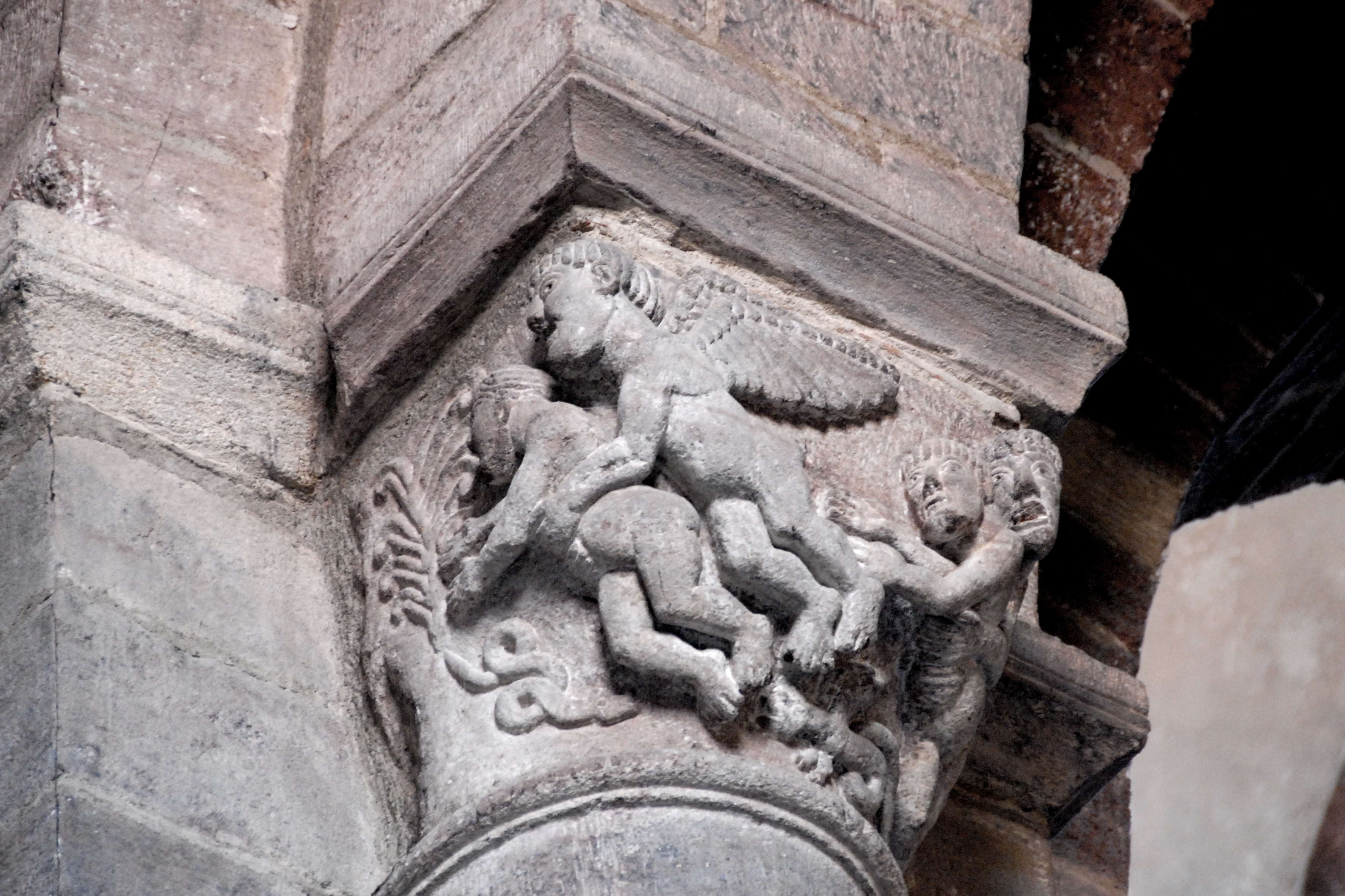 St.-Julien Brioude, Engel tragen Erlöste